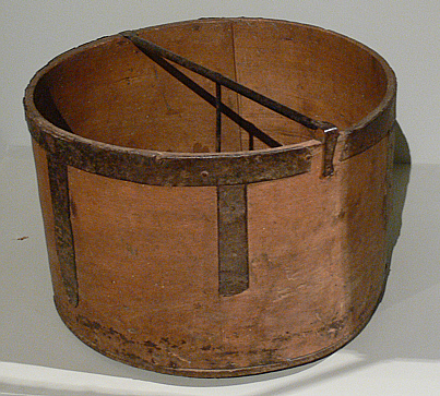 Simri (württembergisches Hohlmaß für Getreide bis 1875), aus Buchenholz und geschmiedetes Eisen, aus Feldstetten (heute zu Laichingn), 19. Jh. Landesmuseum Württemberg (Außenstelle: Museum für Volkskultur Waldenbuch) E.4, Inv. Nr. 1989/350